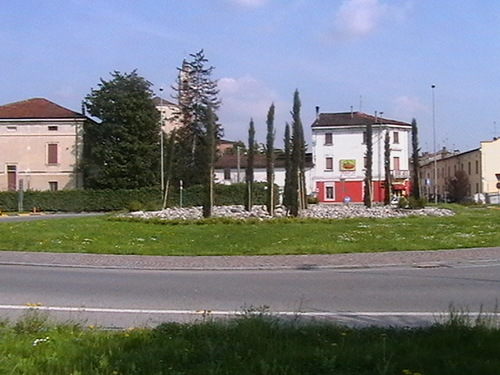 Vista di Pralboino arrivando da Milzano.